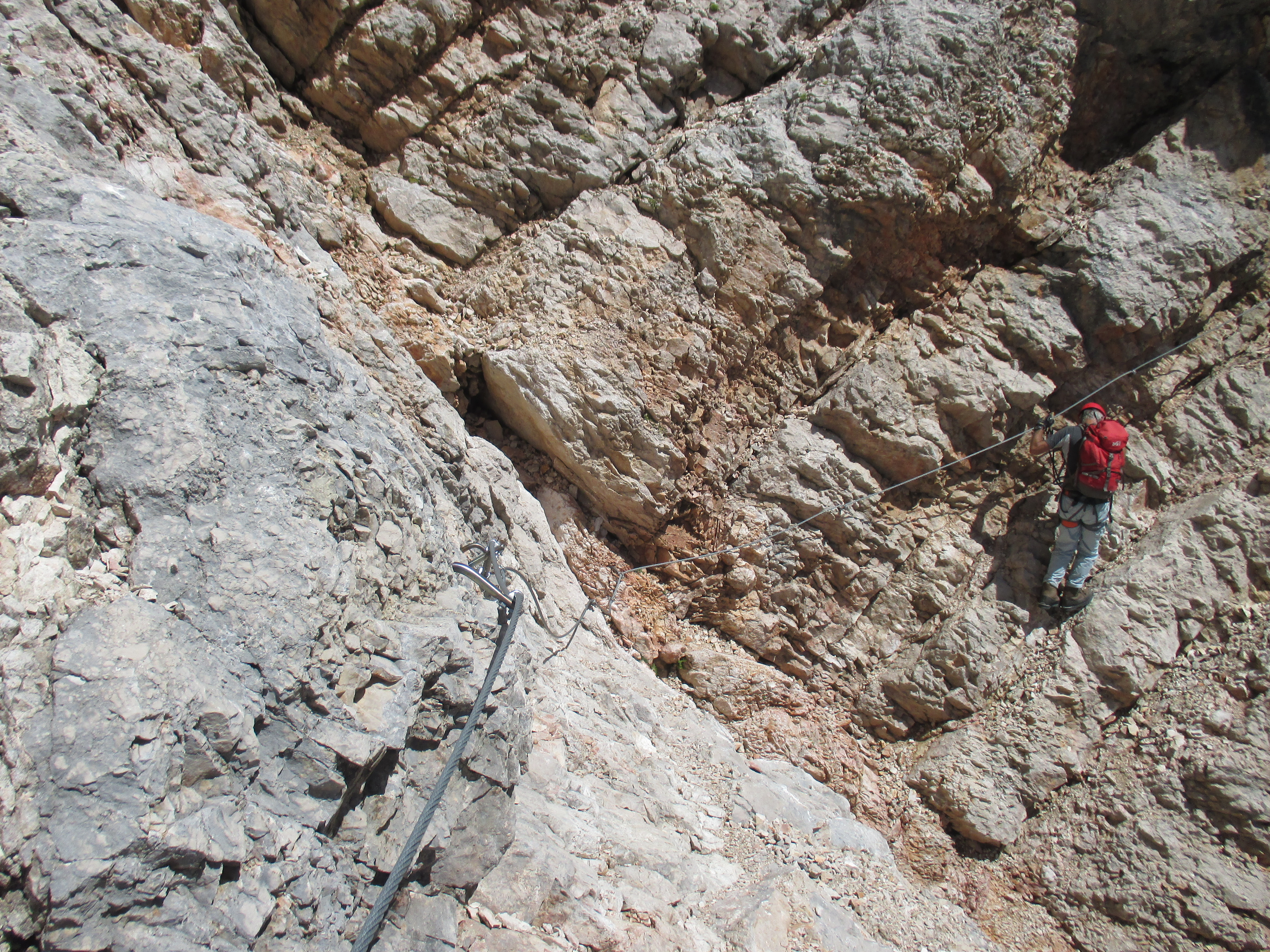 Les vires sur la via ferrata Ivano Dibona permettent de passer de col en col